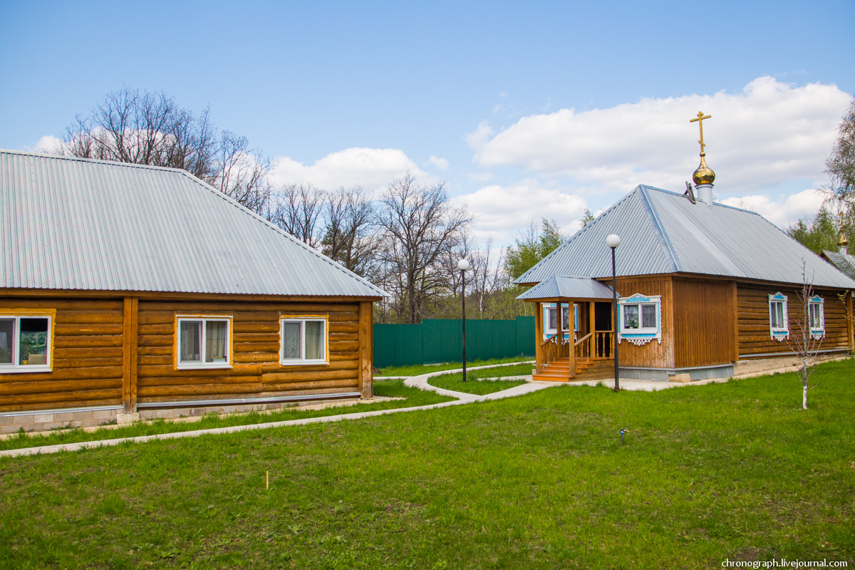 Мужской монастырь святого благоверного князя Александра Невского, Старая Бинарадка, Самарская область, Россия